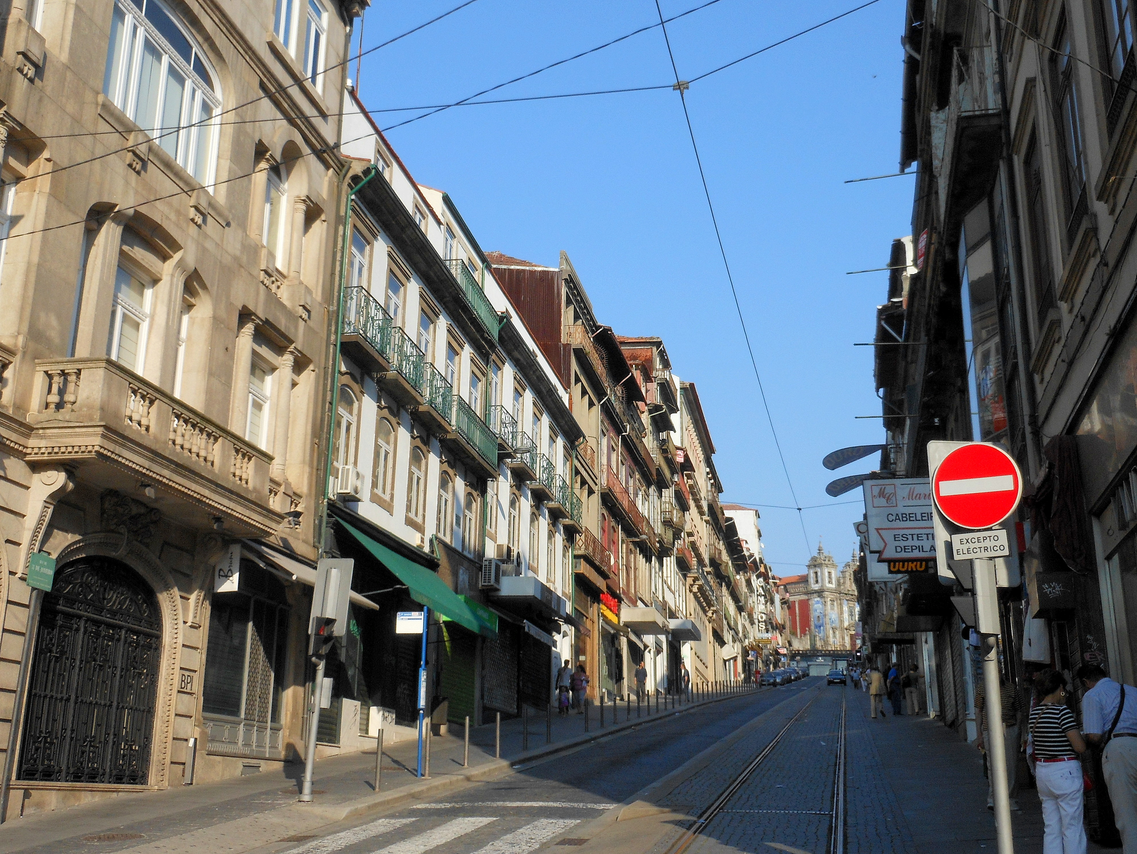 Rua de 31 de Janeiro, Porto, Portugal.